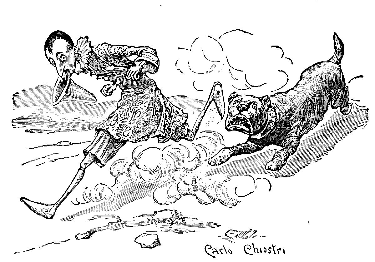 Illustrations from "Le avventure di Pinocchio, storia di un burattino", Carlo Collodi, Bemporad & figlio, Firenze 1902 (Drawings and engravings by Carlo Chiostri, and A. Bongini)